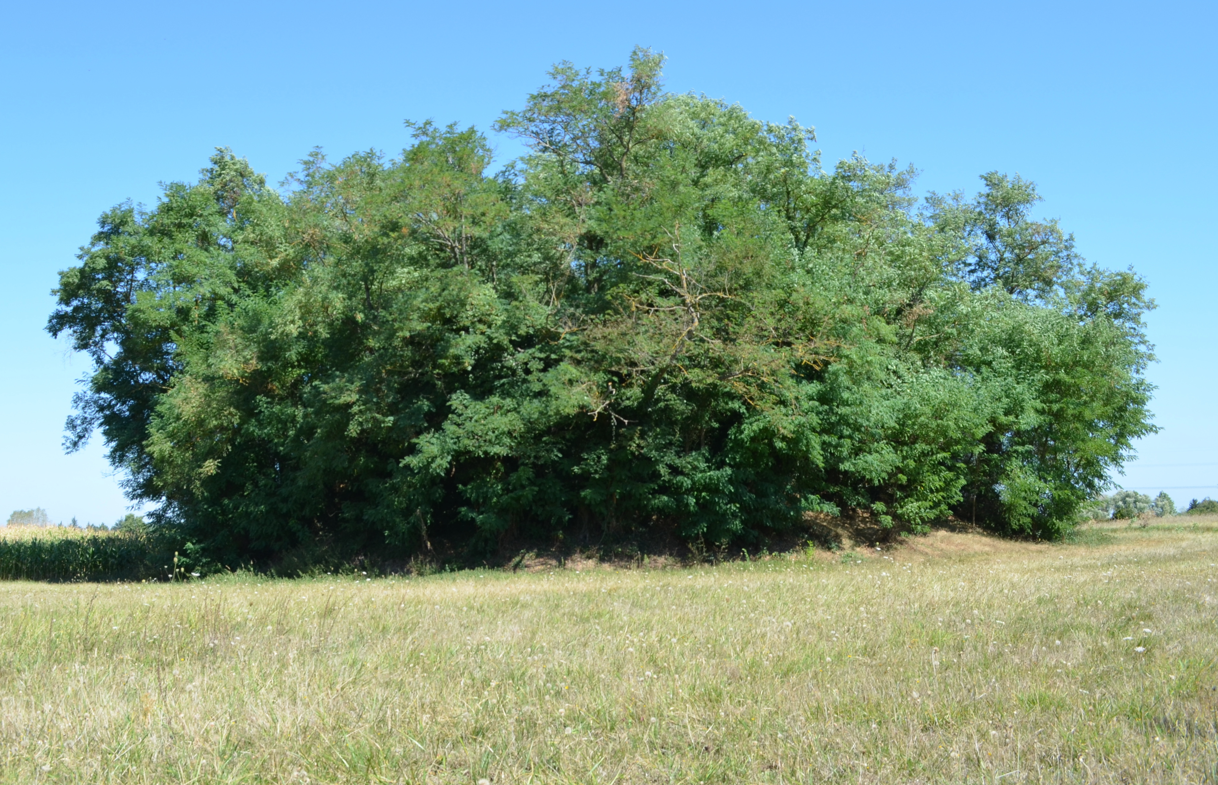 Motte castrale de Saint-André-de-Corcy, située Rue de la Poype, dans l'Ain en France. .